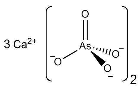 Calciumarsenaat